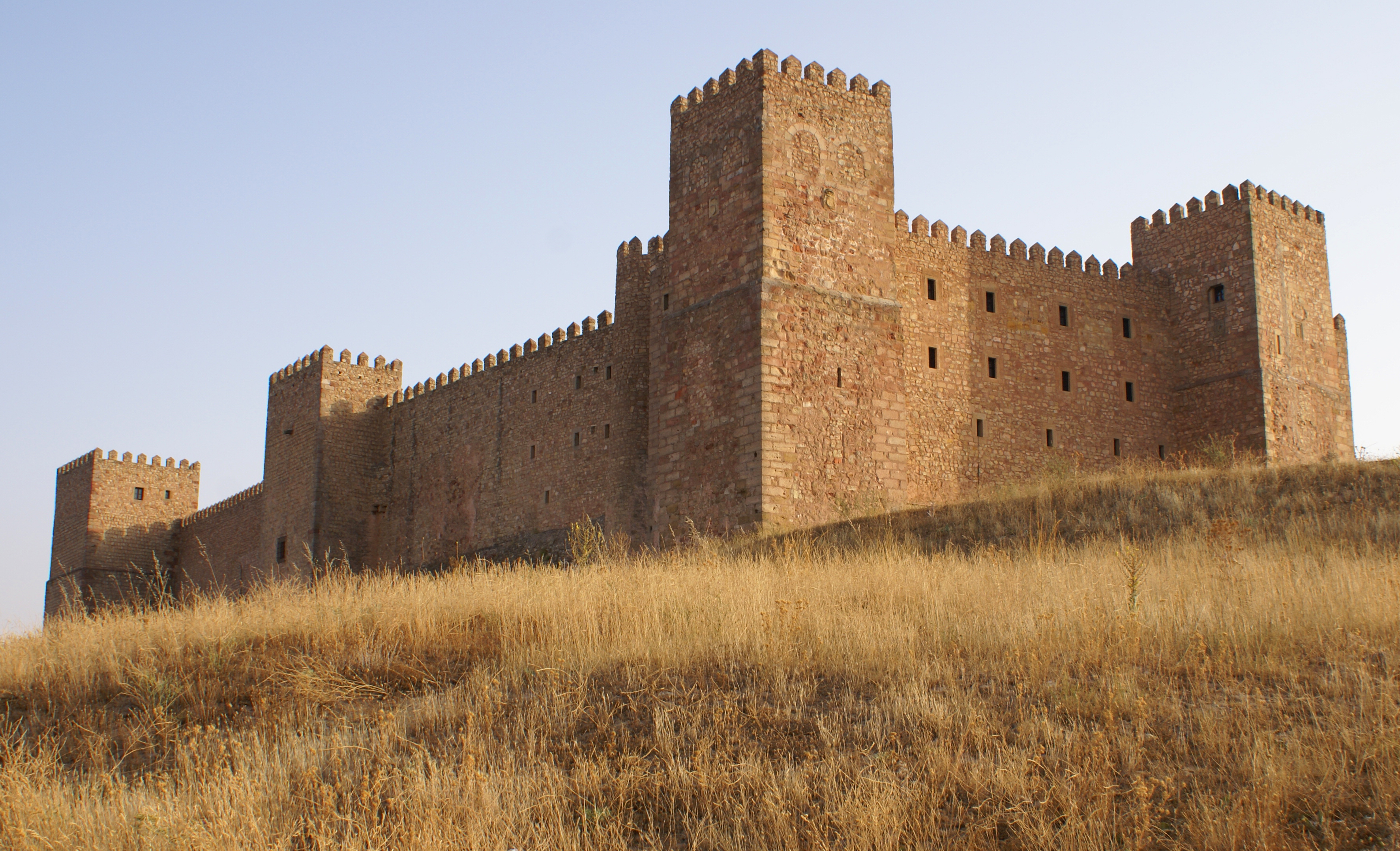 Castillo de Sigüenza See also: Castles in Spain.